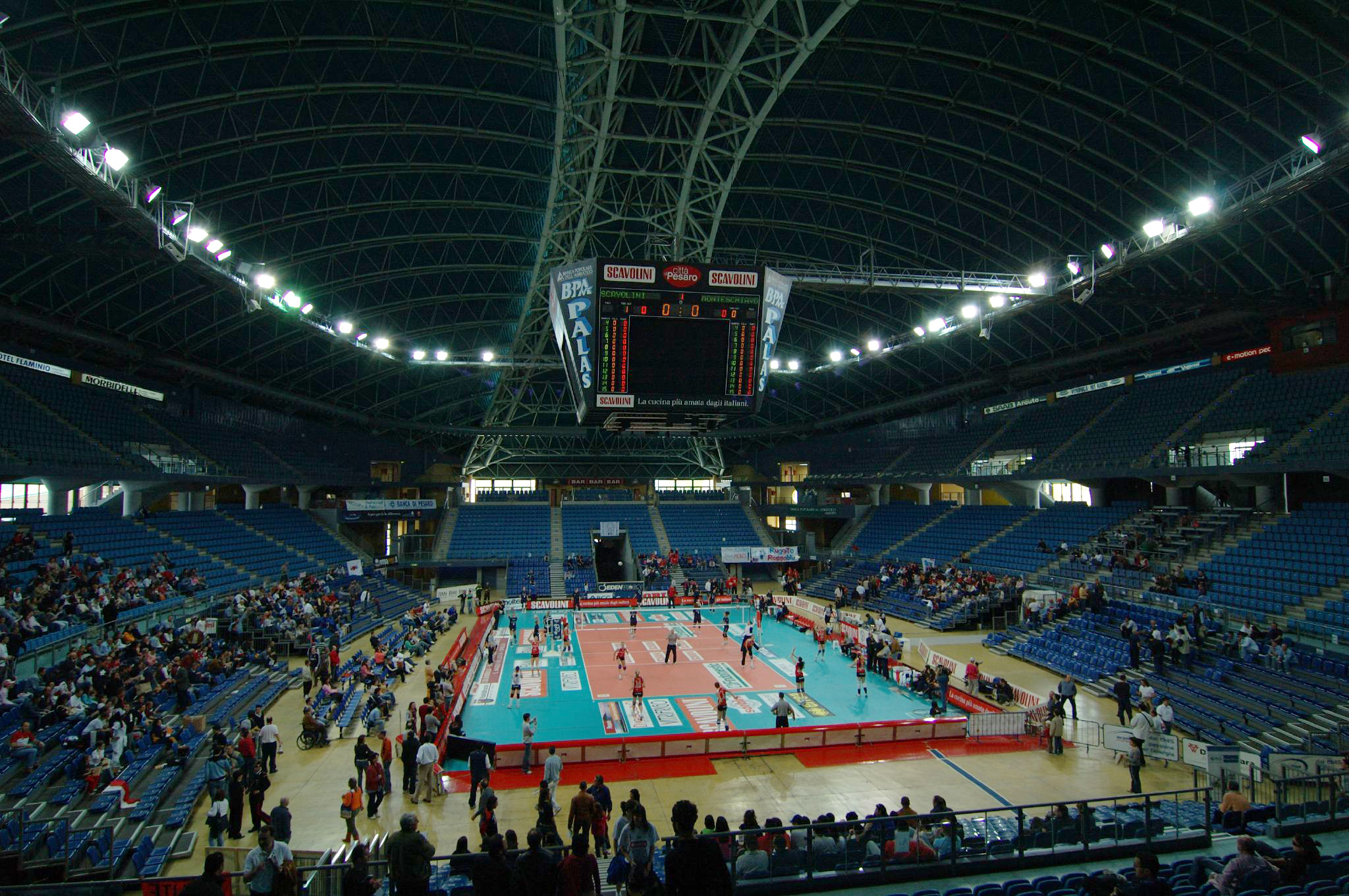 Pesaro, Marche, Italia